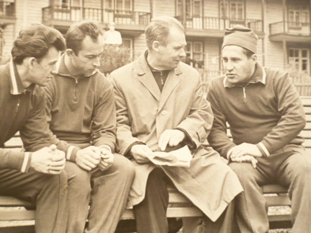 ЗМС СССР Г.П.Пискунов с воспитанниками